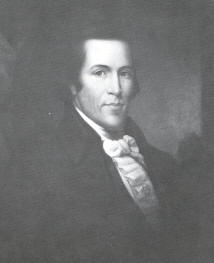 John Breckinridge (1760-1806)